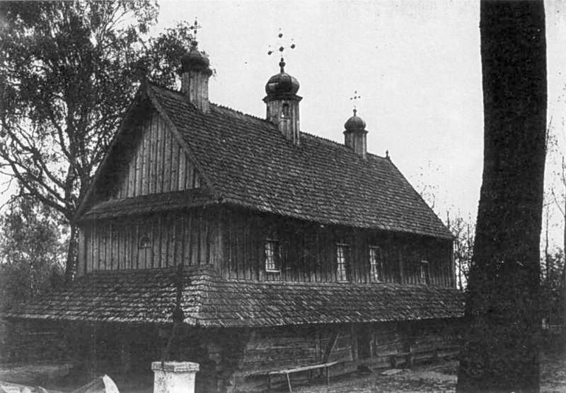 Pynyany._Church._Kuzma_and_Demian,_XVIII_c.